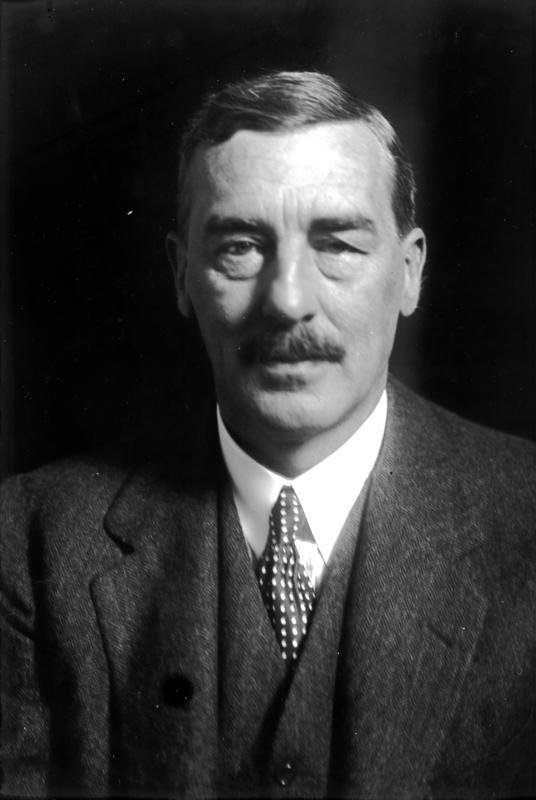 Der englische Botschafter in Berlin Sir Ronald Lindsay von seinem Berliner Posten abberufen. Er ist zum ständigen Unterstaatssekretär im Foreigen-Office ernannt. Porträt des englischen Botschafters Sir Ronald Lindsay.